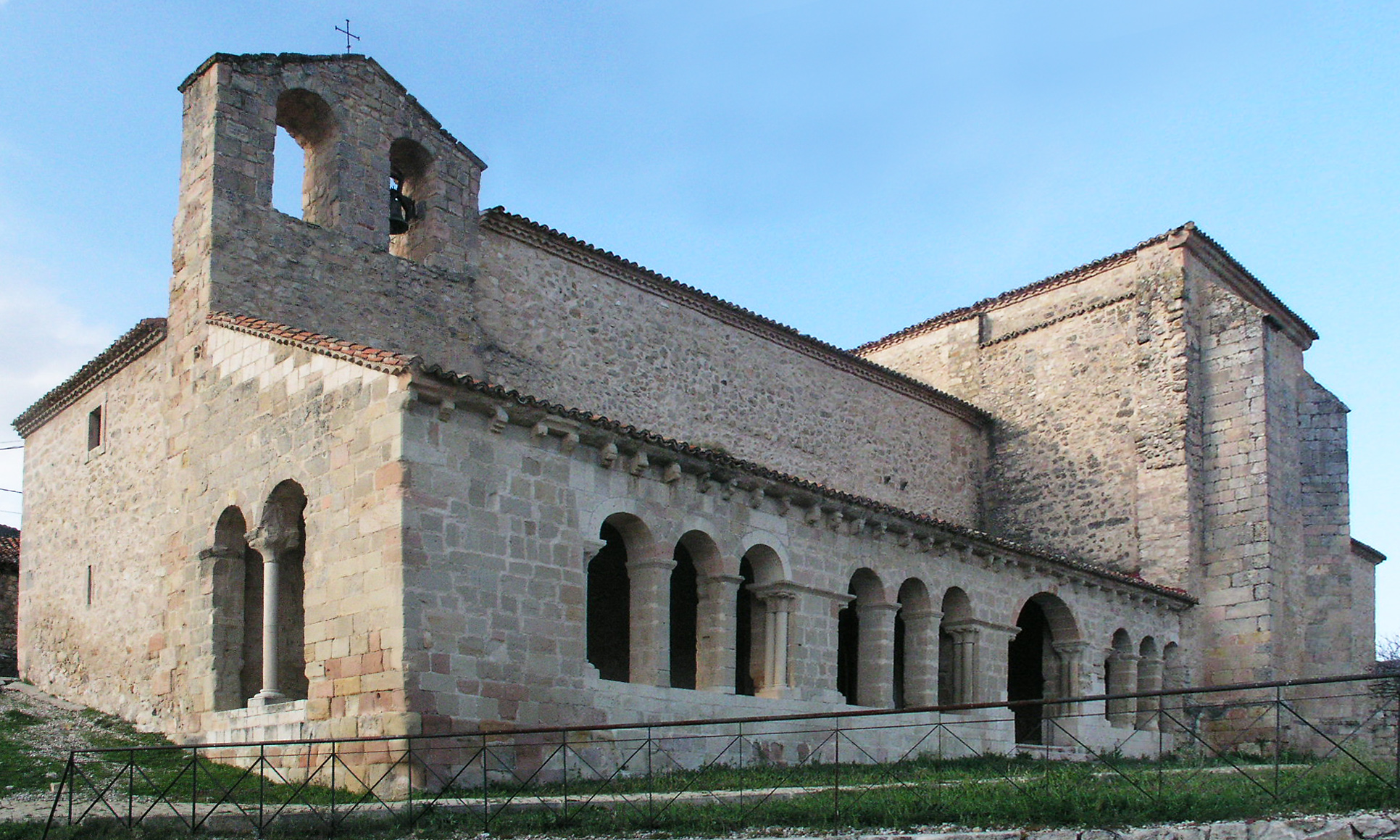 Beleña de Sorbe, es un municipio de la provincia de Guadalajara, en Castilla-La Mancha, España.